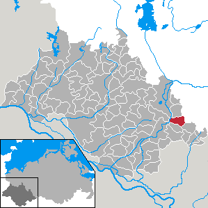 Muchow in Mecklenburg-Vorpommern - district Ludwigslust